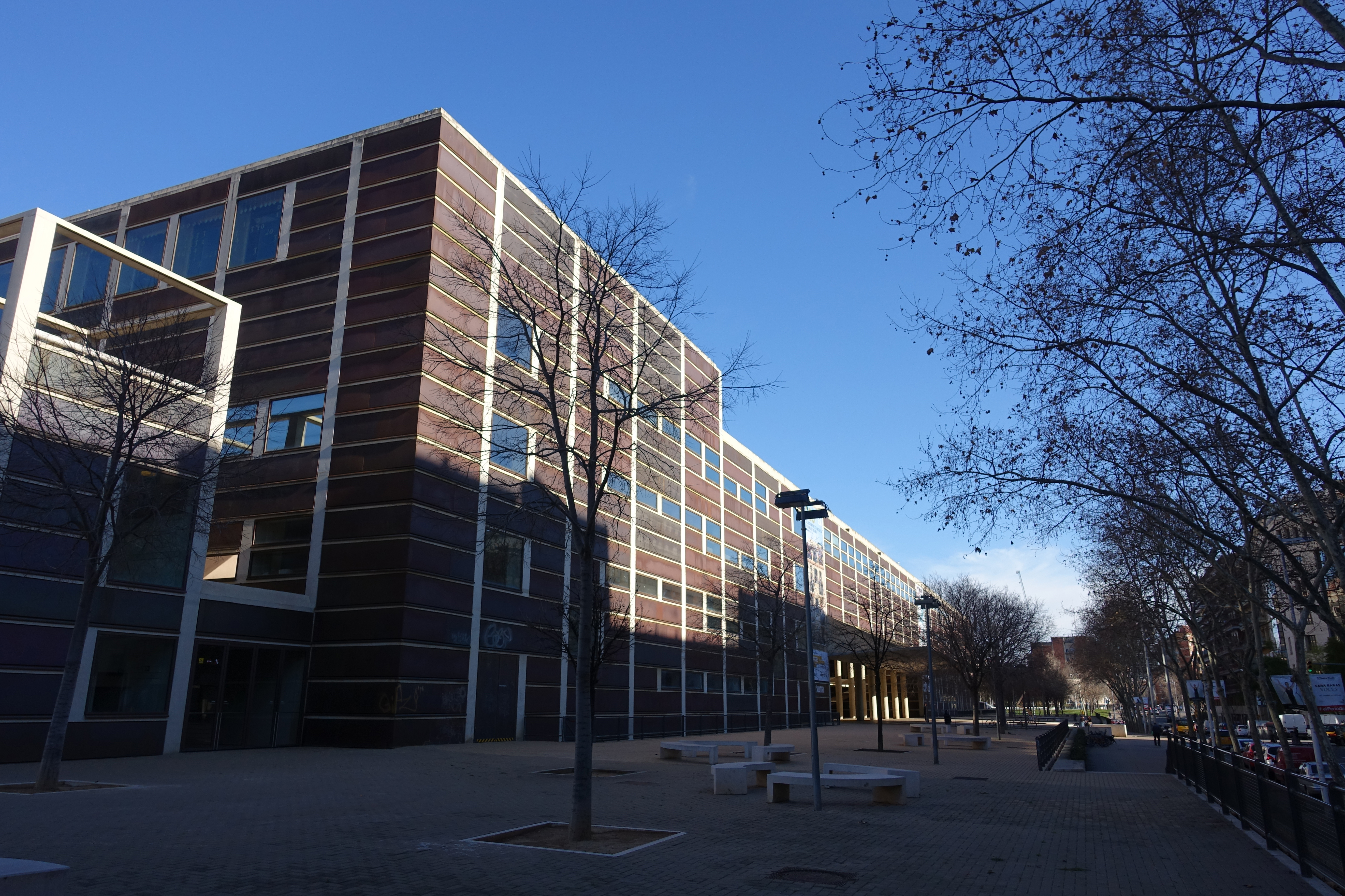 Escola Superior de Música de Catalunya